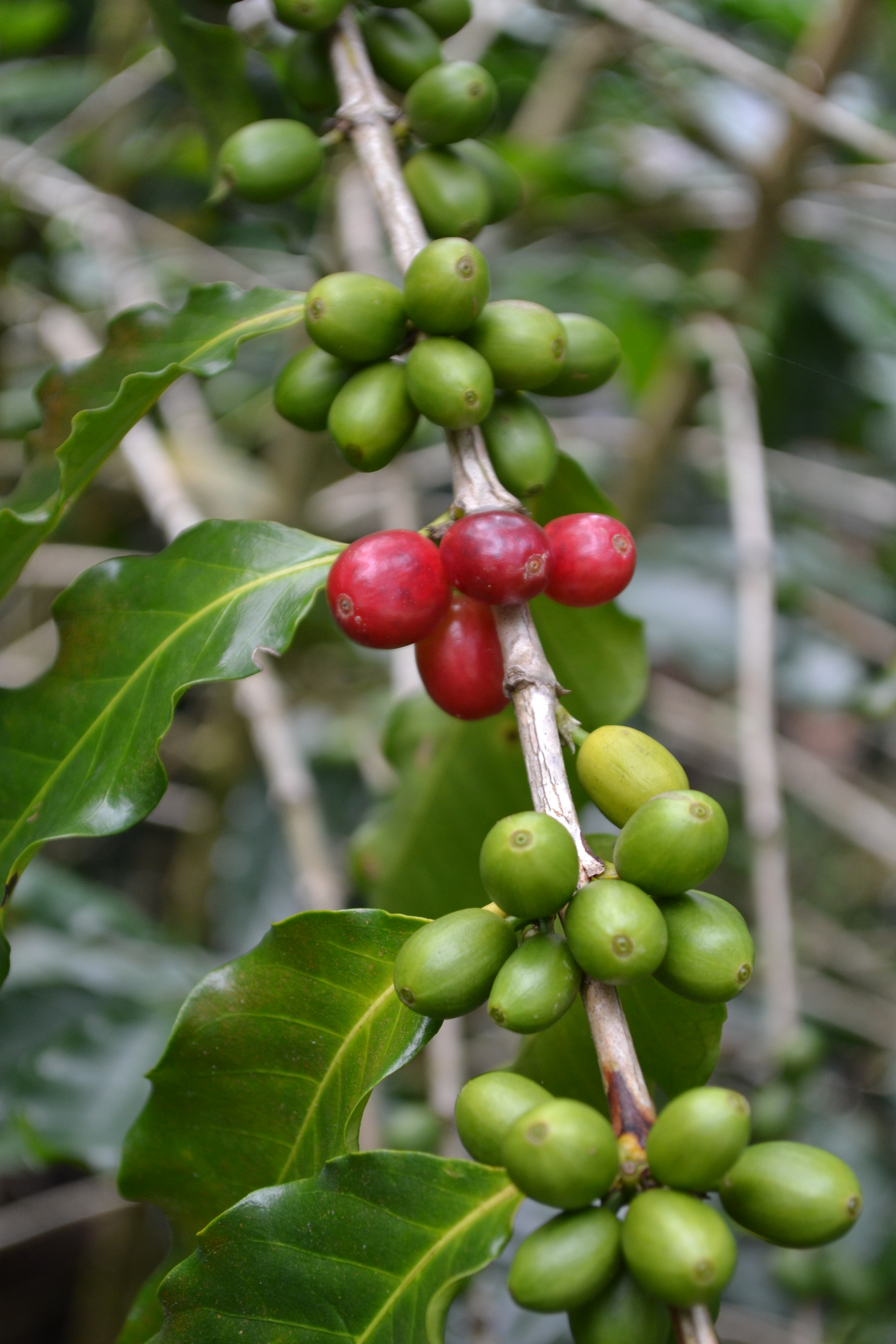 Planta de café de Cuetzalan